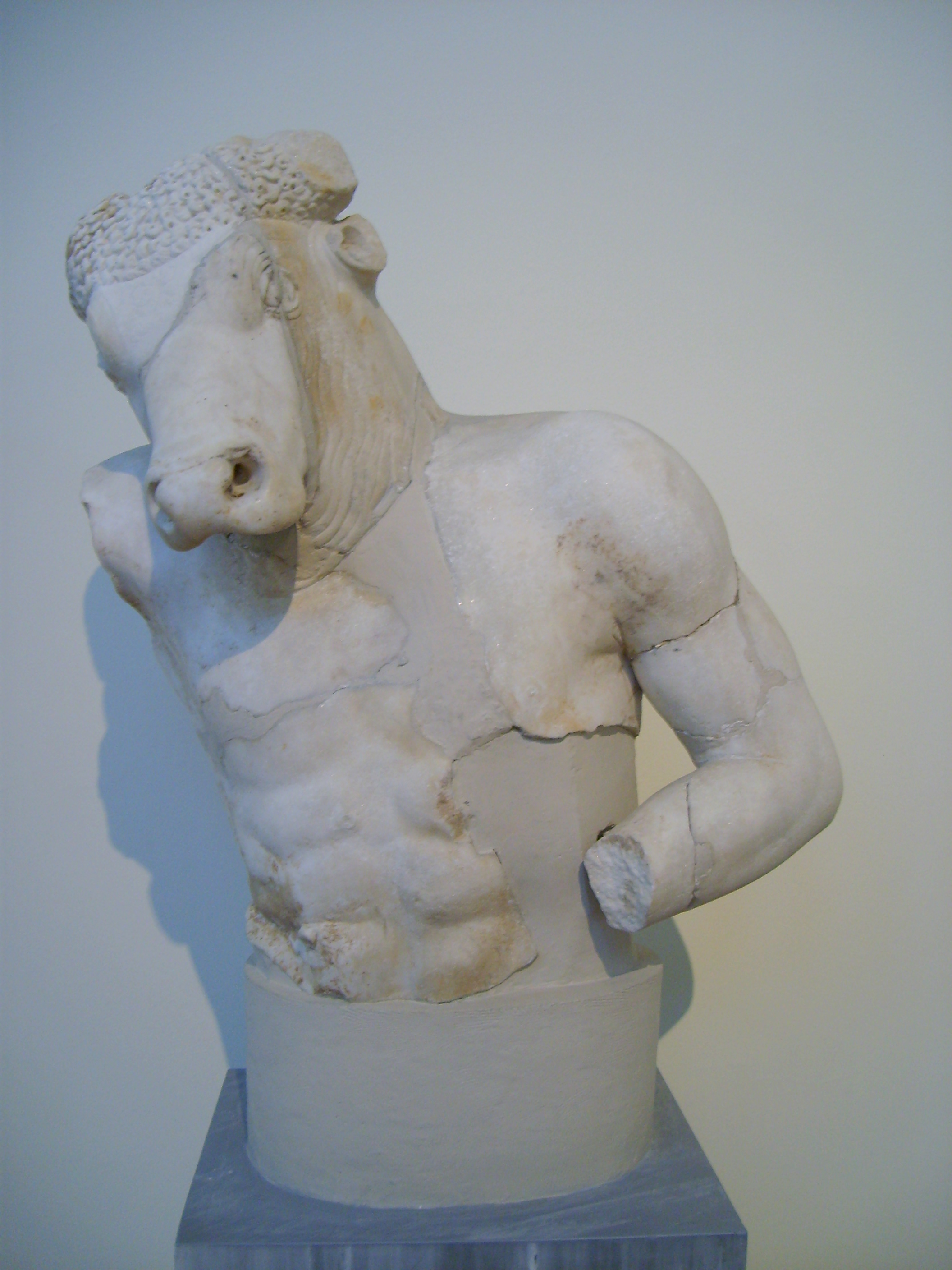 Buste d'une statue appartenant à un groupe représentant Thésée et le Minotaure, érigé sur une fontaine à Athènes près de St Démétrios Katéphoris à Plaka. Il s'agit d'une copie du célèbre groupe statuaire dû à Myron érigé sur l'acropole qui représentait Thésée combattant le minotaure. Musée archéologique national, Athènes, n° 1664.